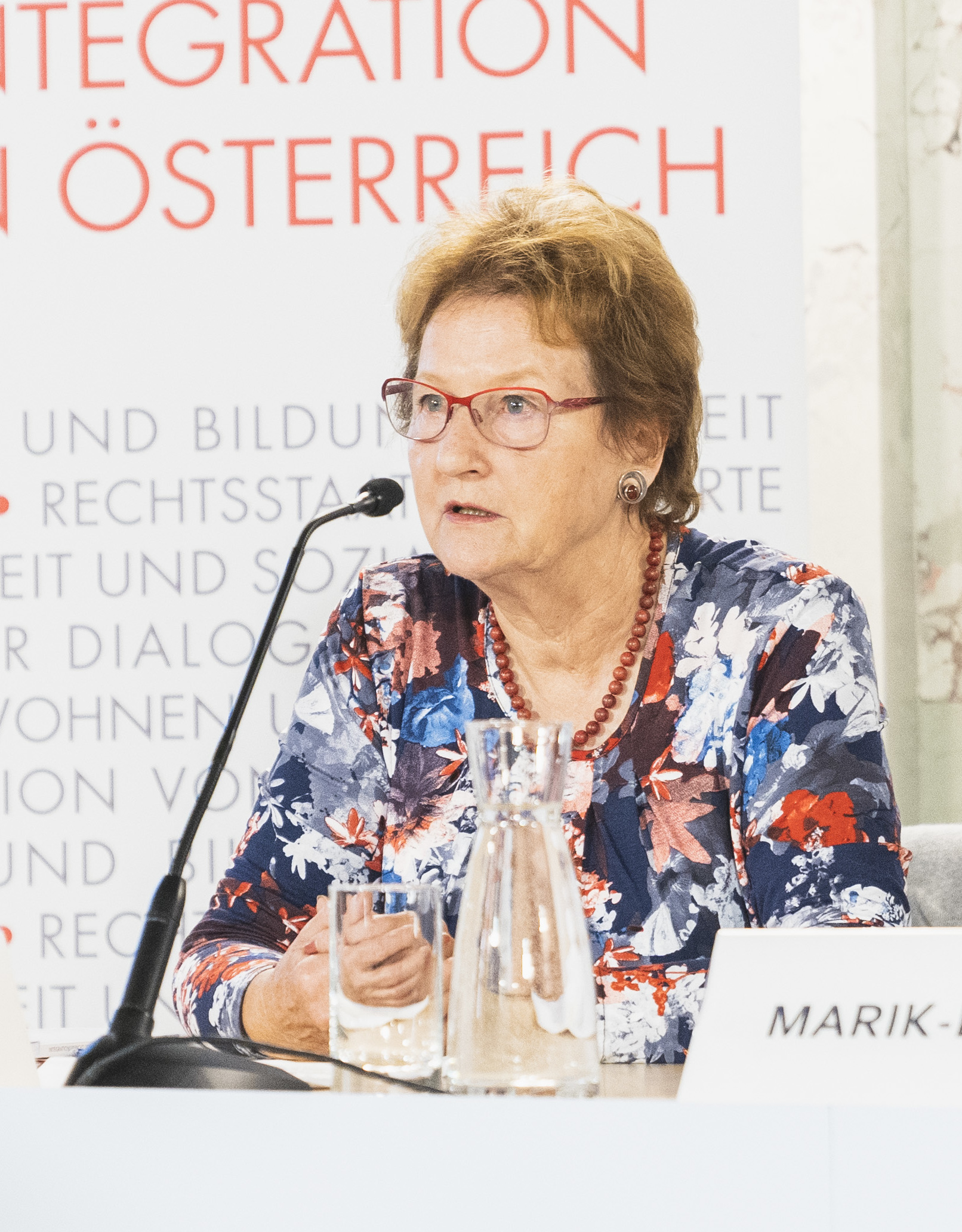 Gudrun Biffl bei der Präsentation vom Integrationsbericht 2019, Wien, 4. September 2019 Copyright: BMEIA/ Eugénie Berger